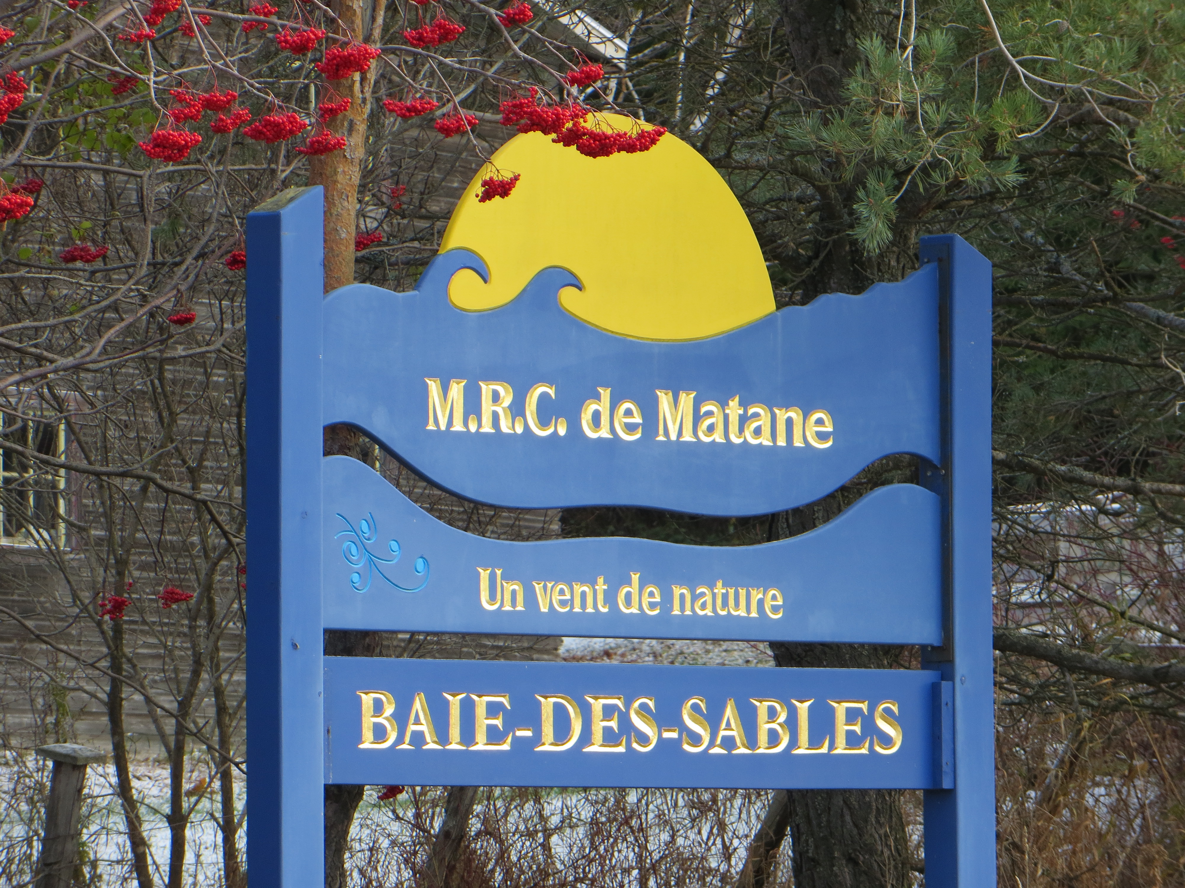 Aviso de bienvenida de Baie-des-Sables.